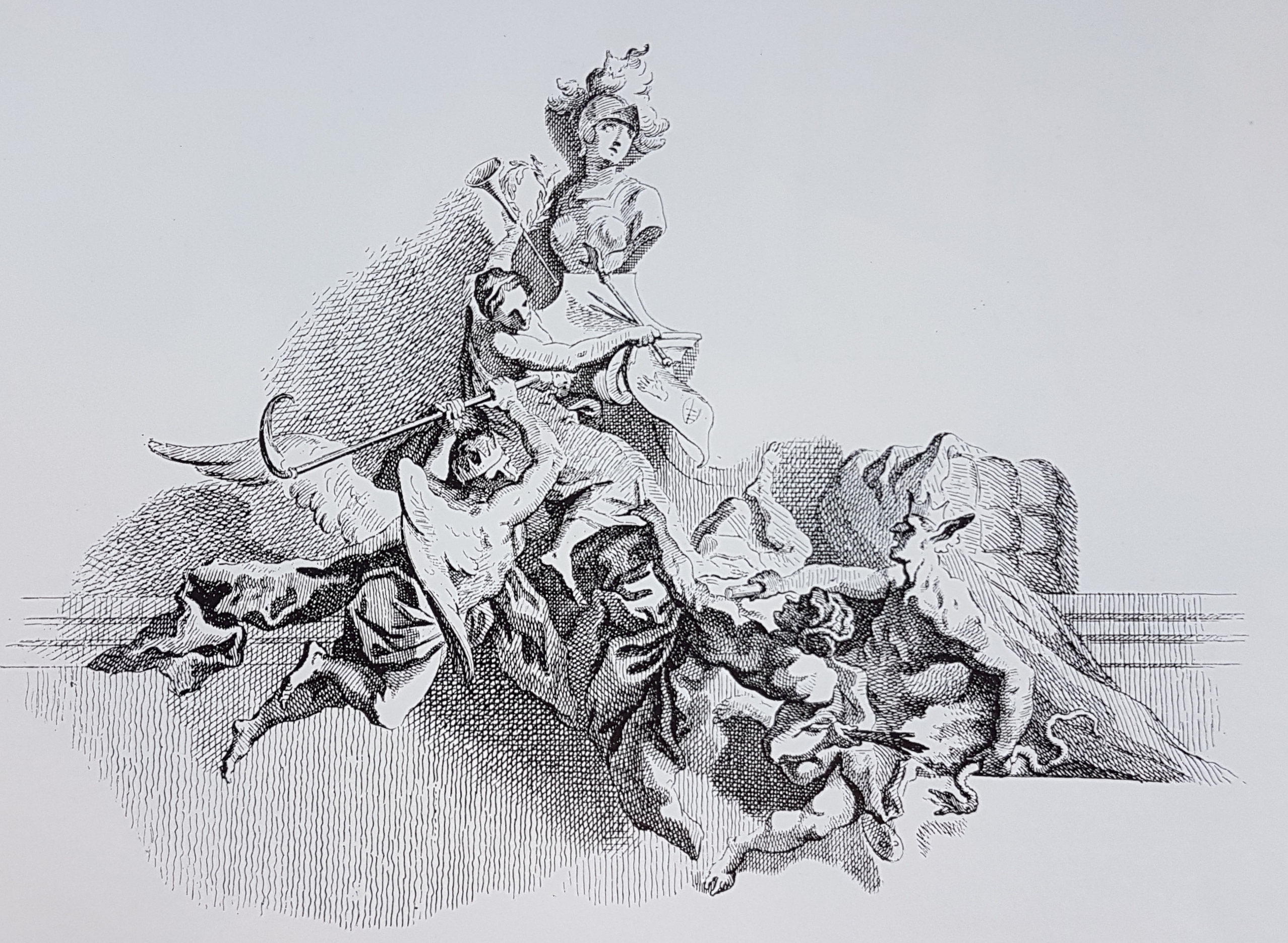 Konsten hotad av våld och avund, räddad genom tiden. Kopparstick av Johannes Esaias Nilsson. Ingår i Kungliga Bibliotekets samling. Avfotograferad bild från Allhems Svenskt konstnärslexikon.